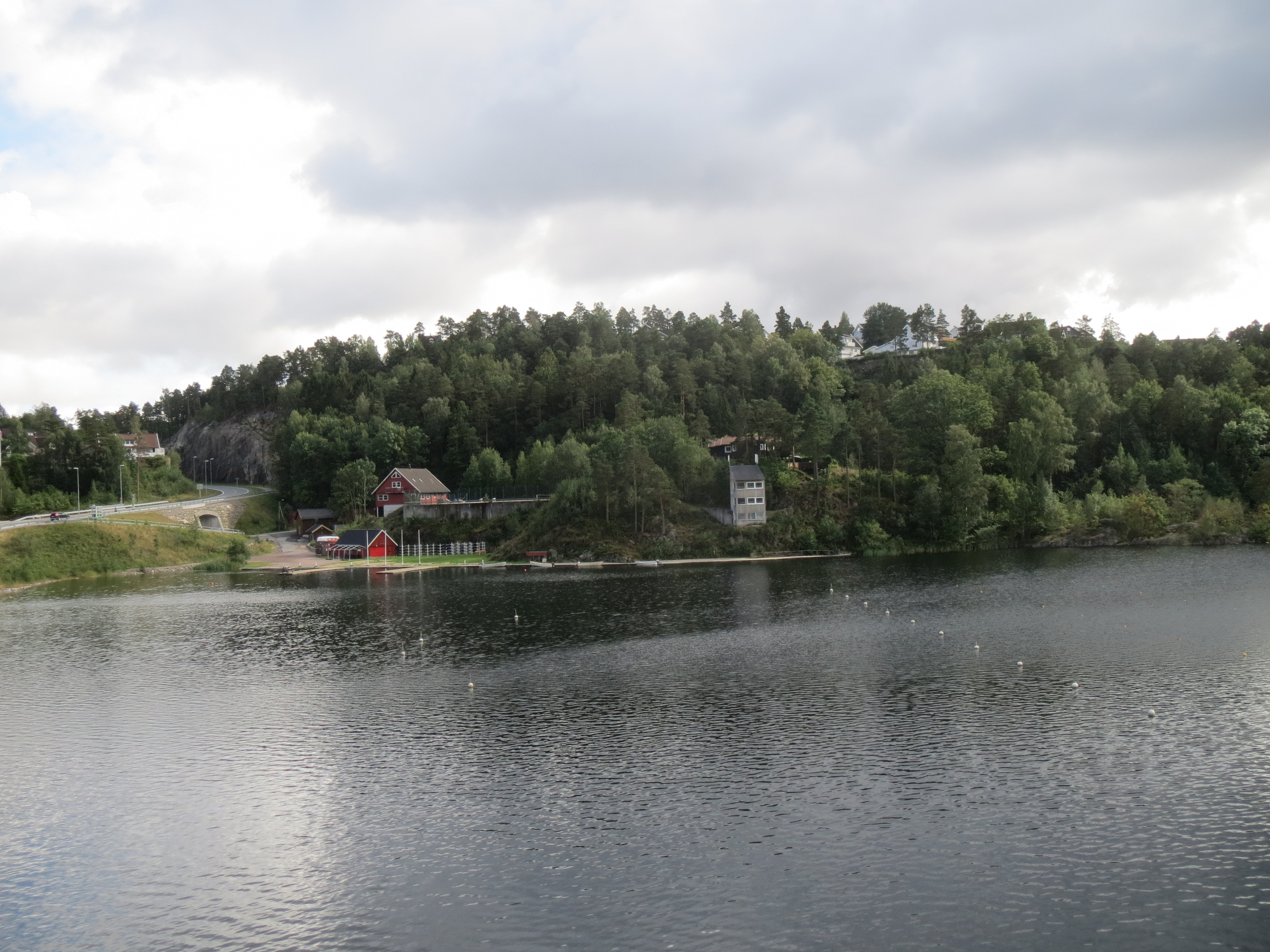 Kristiansand Kajakklubb's anlegg i Gillsvann